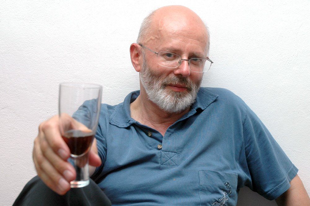 Marek Garztecki of Warszawa, Poland